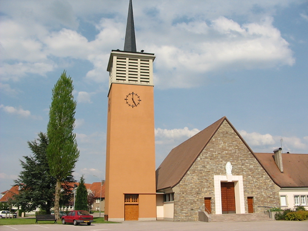 Jeanménil Commune des Vosges L'église de l'Assomption de Notre-Dame Photographie personnelle, prise le 4 mai 2006 Copyright © Christian Amet